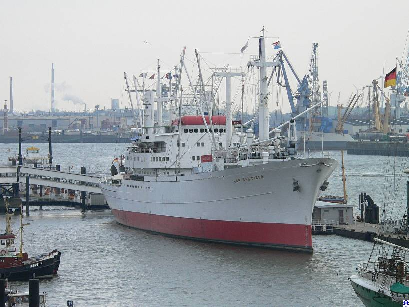 Museumsschiff Cap San Diego in Hamburg, Überseebrücke 28.12.2004